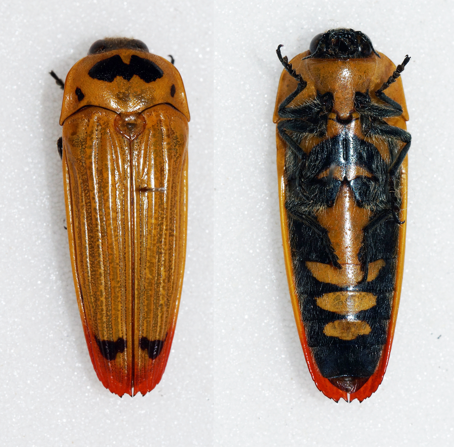 Desmarest,1843 Sex: ? Data: 06-01-12 - San Luis - Argentina Size: 24mm